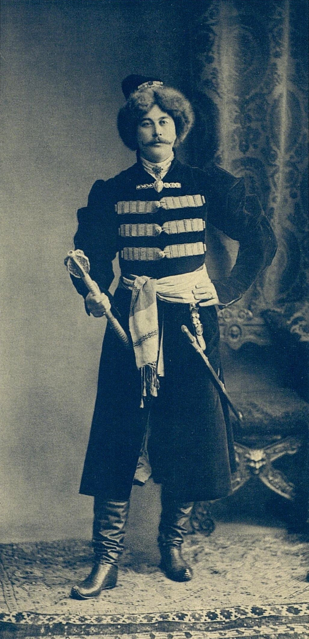 Граф, флигель-адъютант Д.С.Шереметев в костюме, выполненном по портрету боярина Василия Борисовича Шереметева, воеводы киевского, томившегося пятнадцать лет в плену у крымских татар.